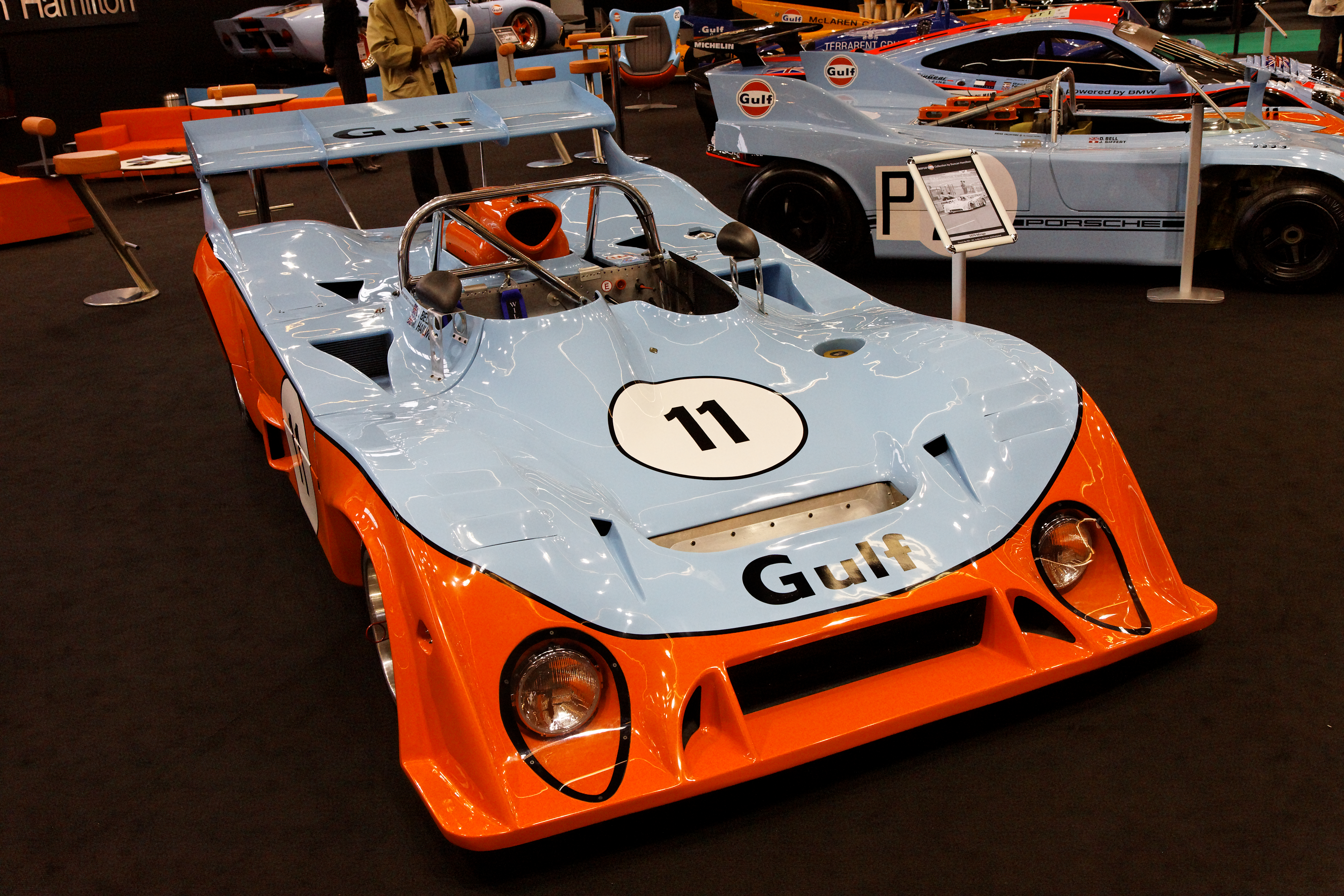 Photographie prise lors du salon rétromobile 2011 à Paris, porte de Versailles.